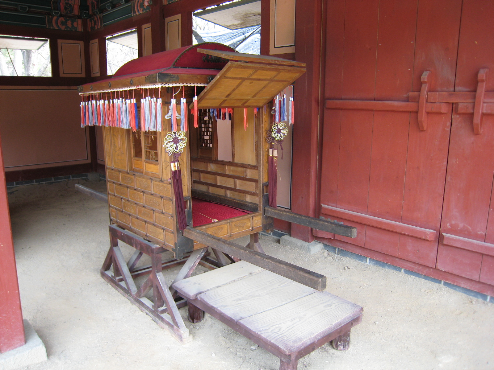 Gama